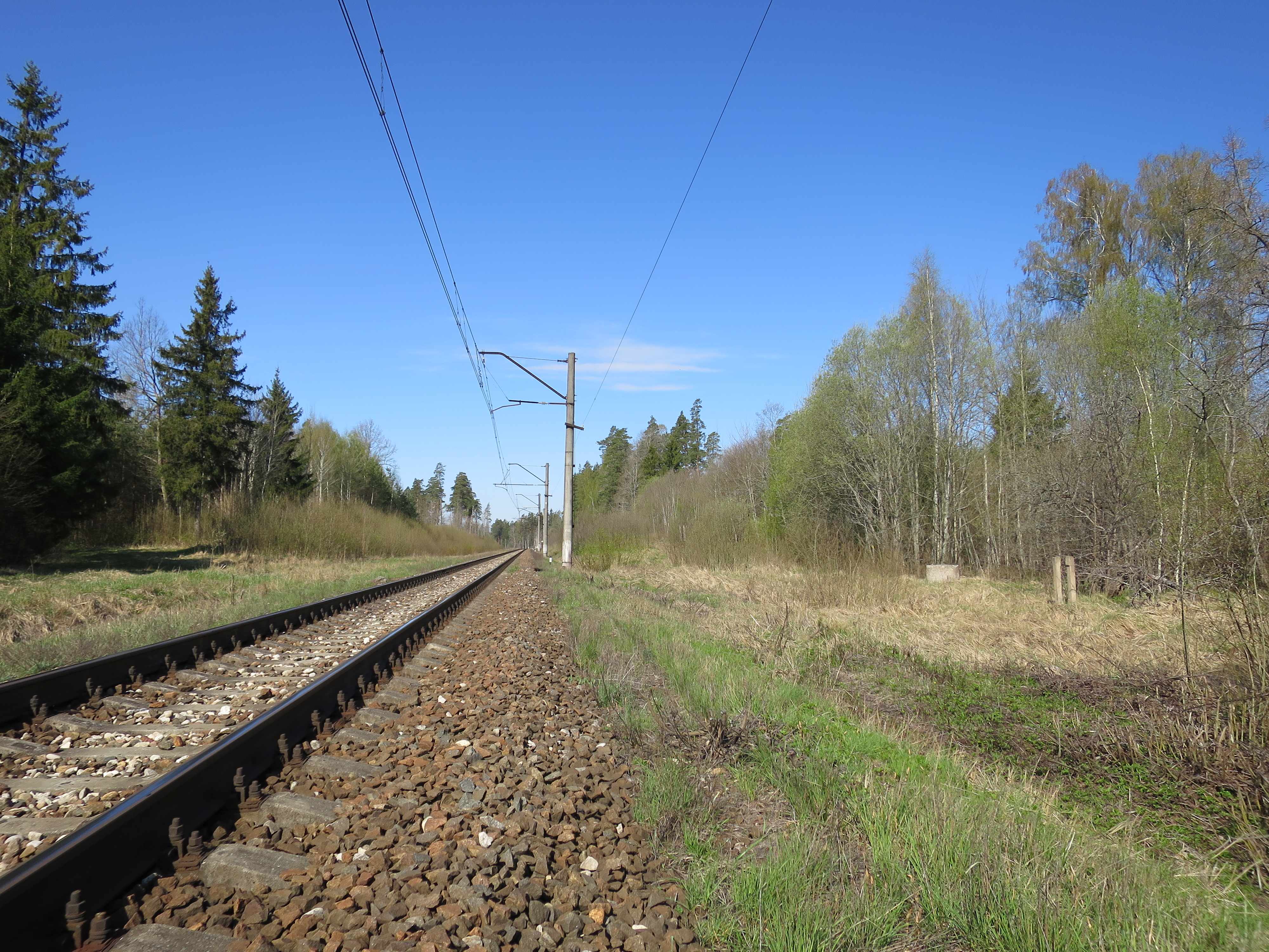 Bijušais 56. kilometra pieturas punkts